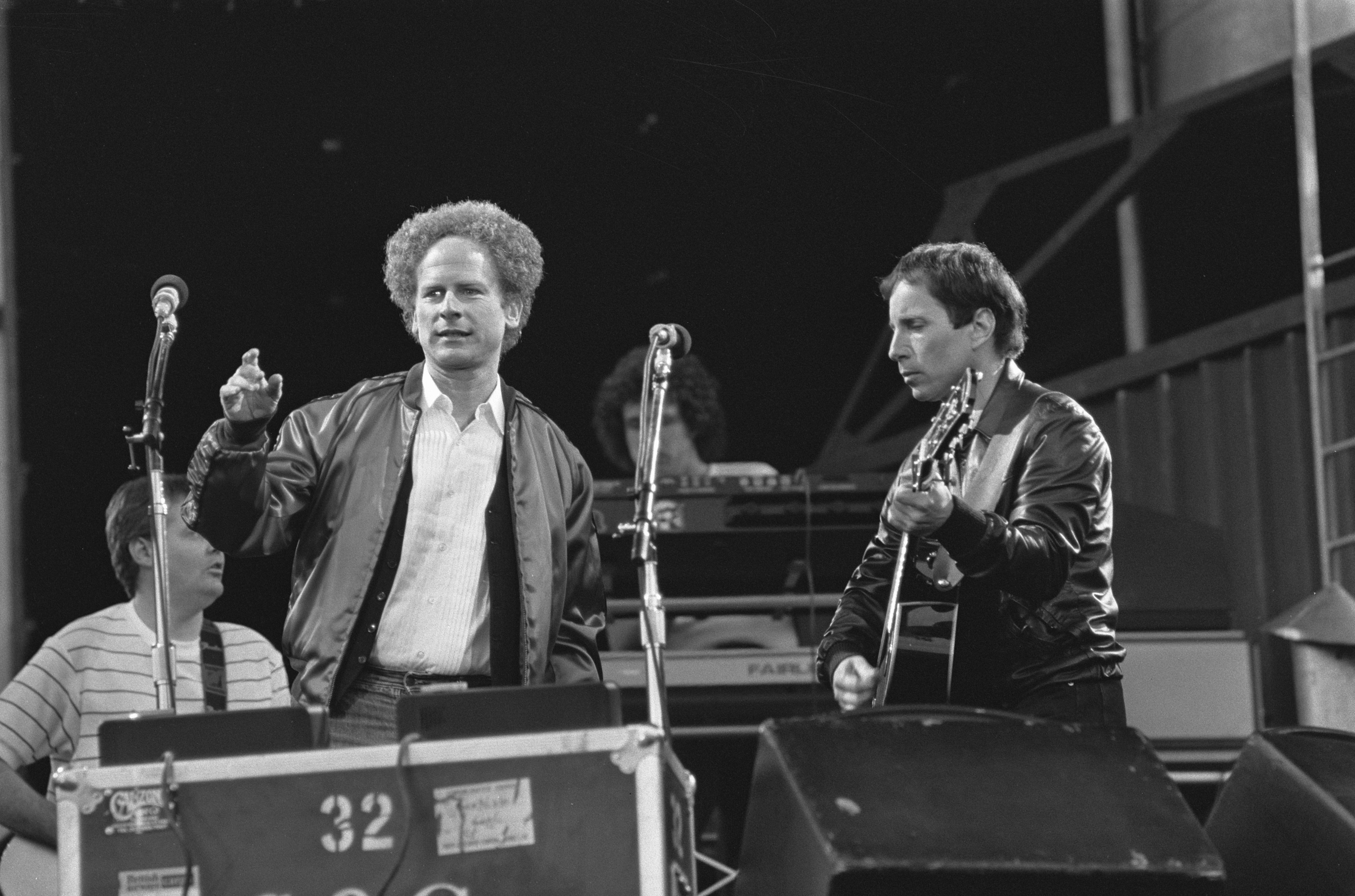 Collectie / Archief : Fotocollectie Anefo Reportage / Serie : [ onbekend ] Beschrijving : Optreden Simon and Garfunkel (links) in Feijenoordstadion, Rotterdam Datum : 12 juni 1982 Locatie : Rotterdam, Zuid-Holland Trefwoorden : musici, muziek, popgroepen, zangers Persoonsnaam : Garfunkel, Art, Simon, Paul Instellingsnaam : Simon & Garfunkel Fotograaf : Bogaerts, Rob / Anefo Auteursrechthebbende : Nationaal Archief Materiaalsoort : Negatief (zwart/wit) Nummer archiefinventaris : bekijk toegang 2.24.01.05 Bestanddeelnummer : 932-2090